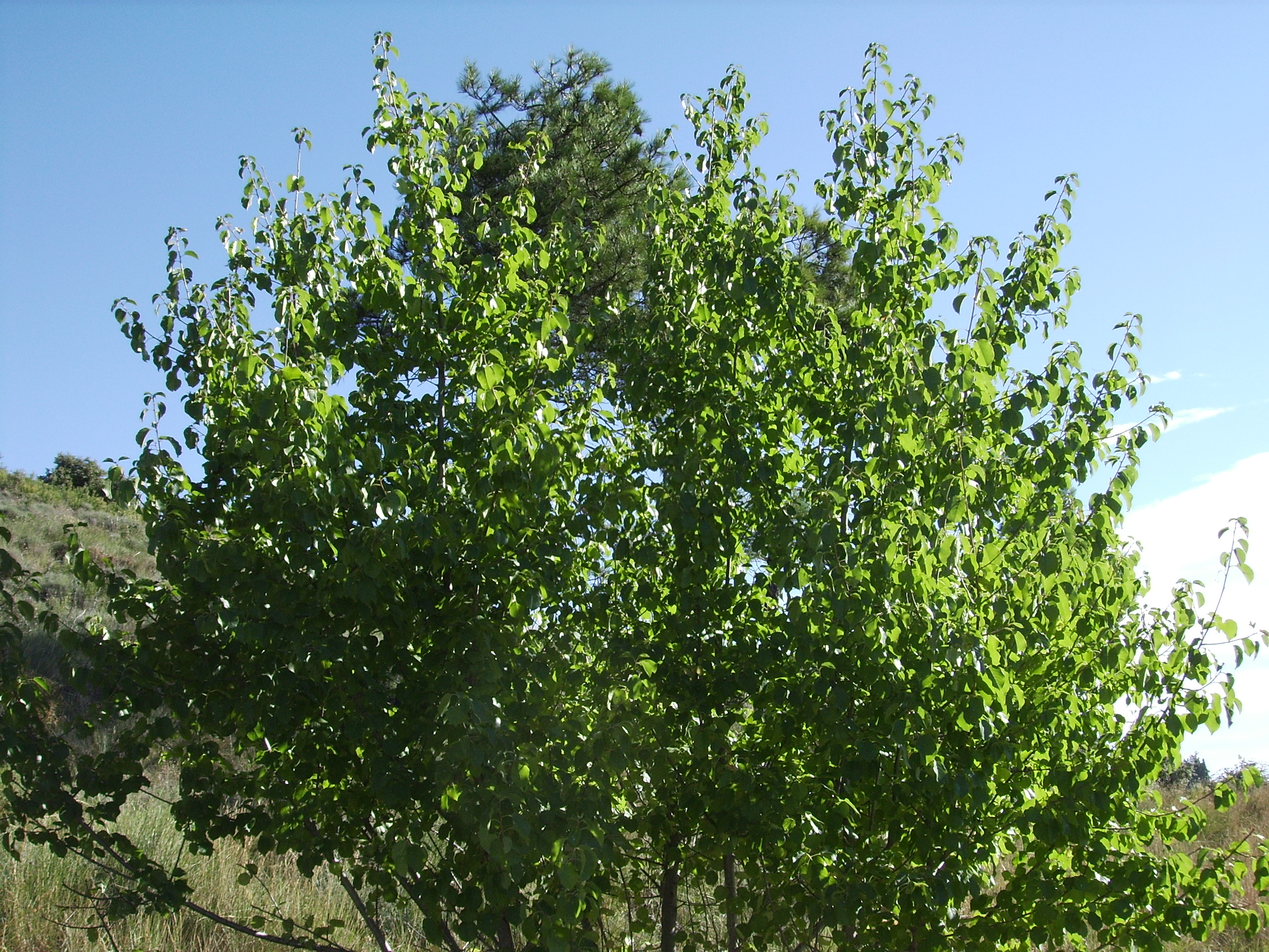 Image:P.mahaleb.jpg Prunus mahaleb at Serra de Castelltallat,Catalonia